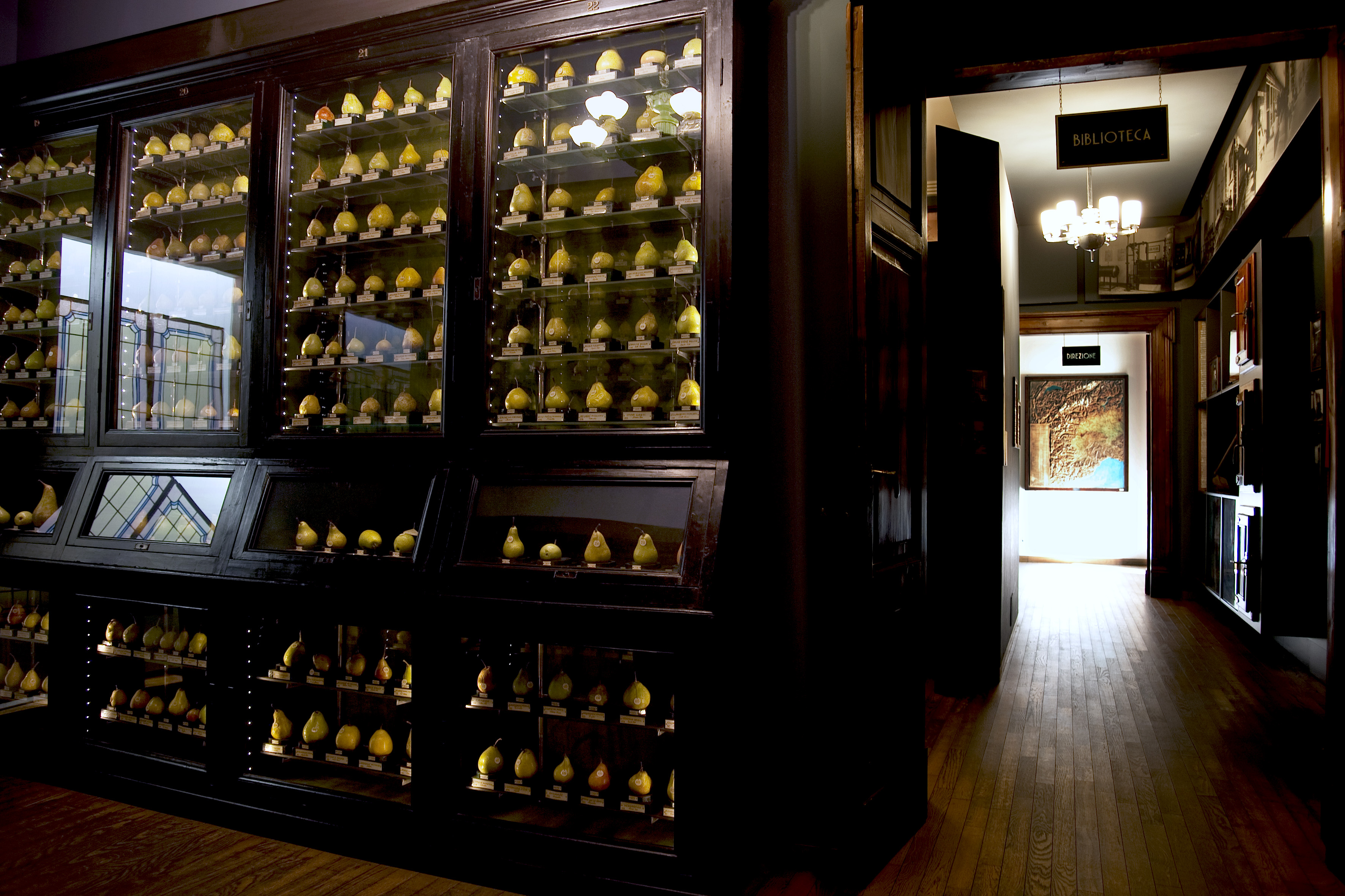 Mario Finotti, 2020